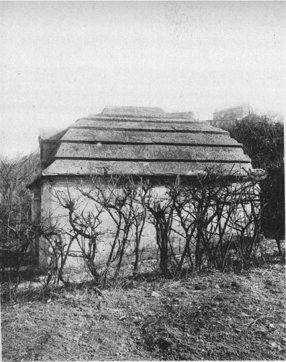 Regard du Trou-Morin, Le Pré-Saint-Gervais. Photo extraite du procès-verbal de la Commission municipale du Vieux Paris, 12 octobre 1899